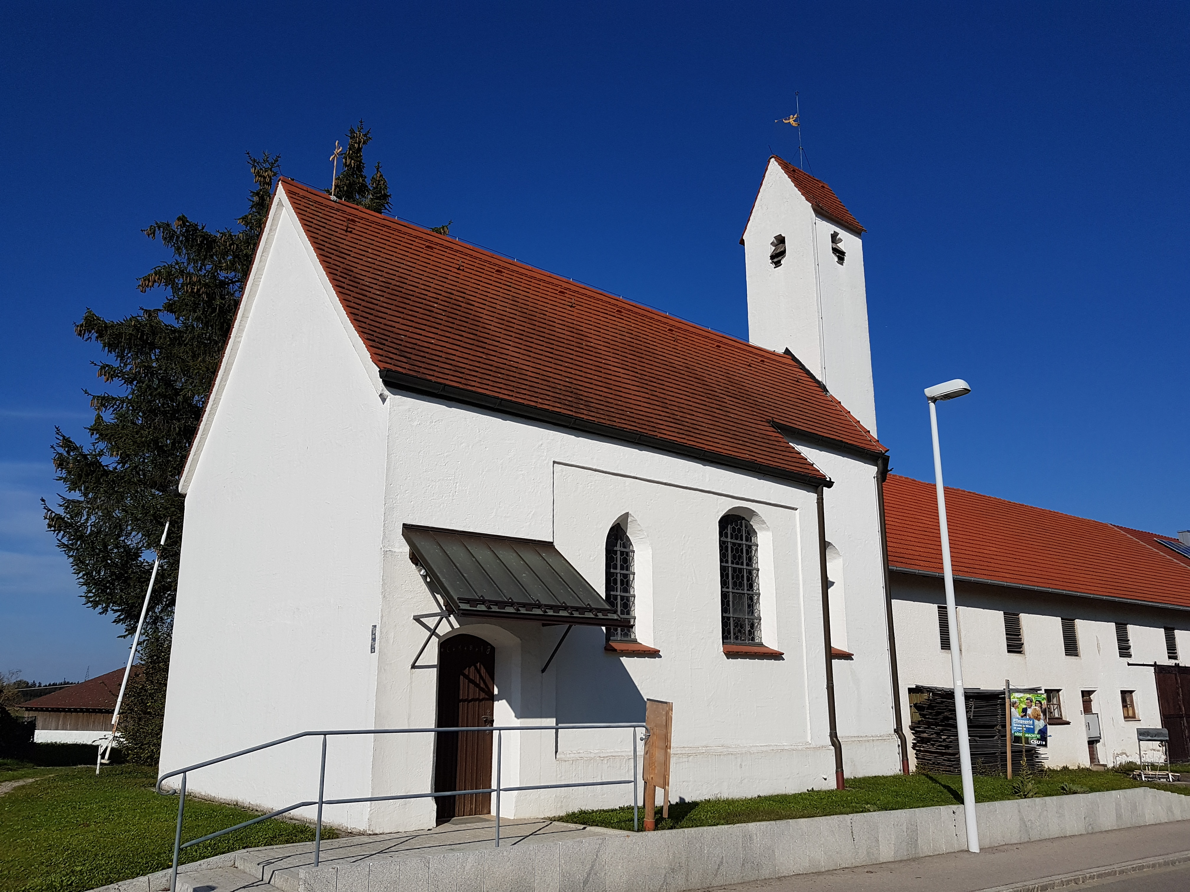 Waltenhofen (Egenhofen), Katholische Filialkirche Heilige Dreifaltigkeit; die reiche hochbarocke exzellente Ausstattung ist seit 6 Jahren durch Baugerüste verstellt.